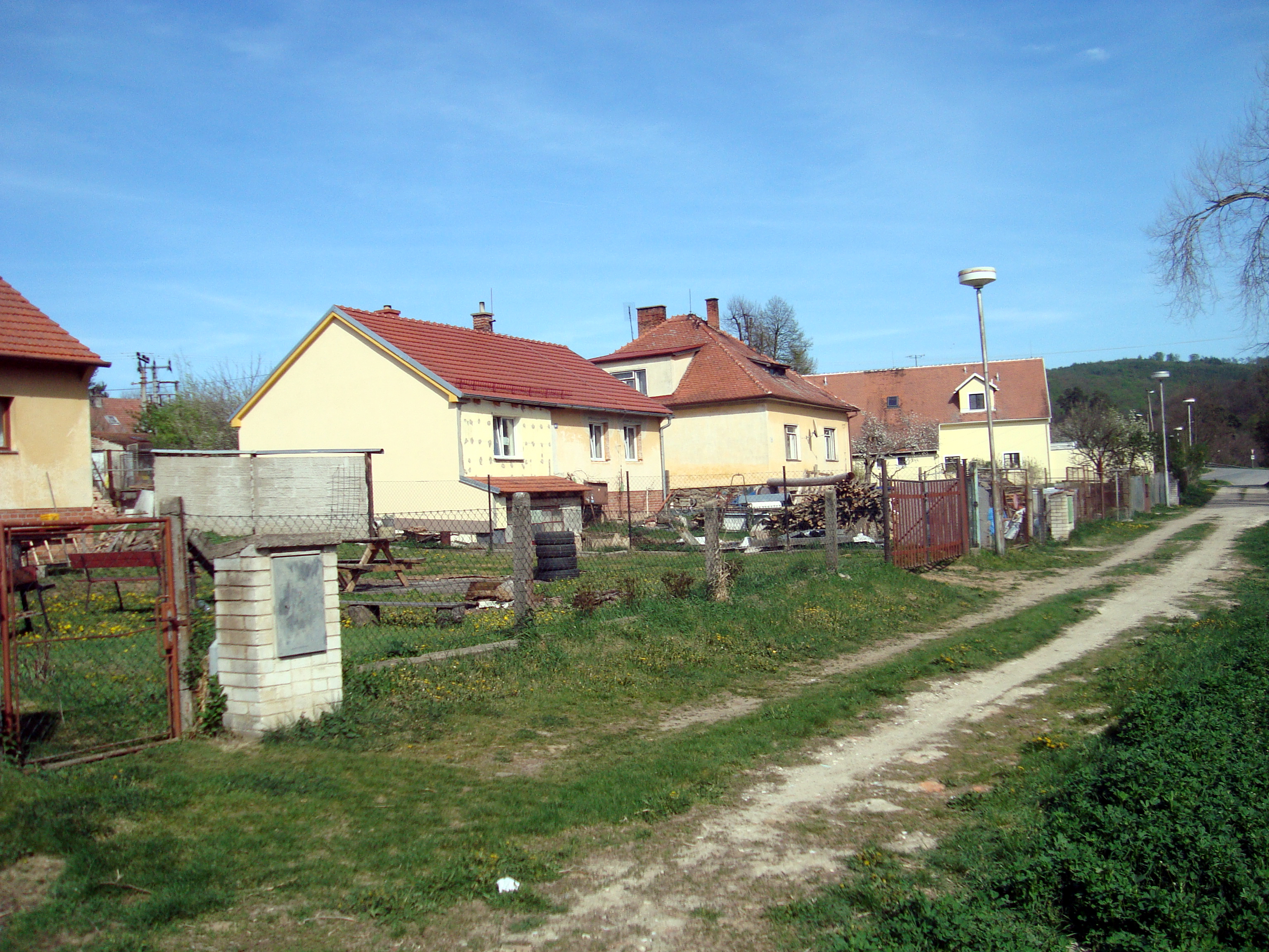 Nový Dvůr (Veverská Bítýška) - boční ulice